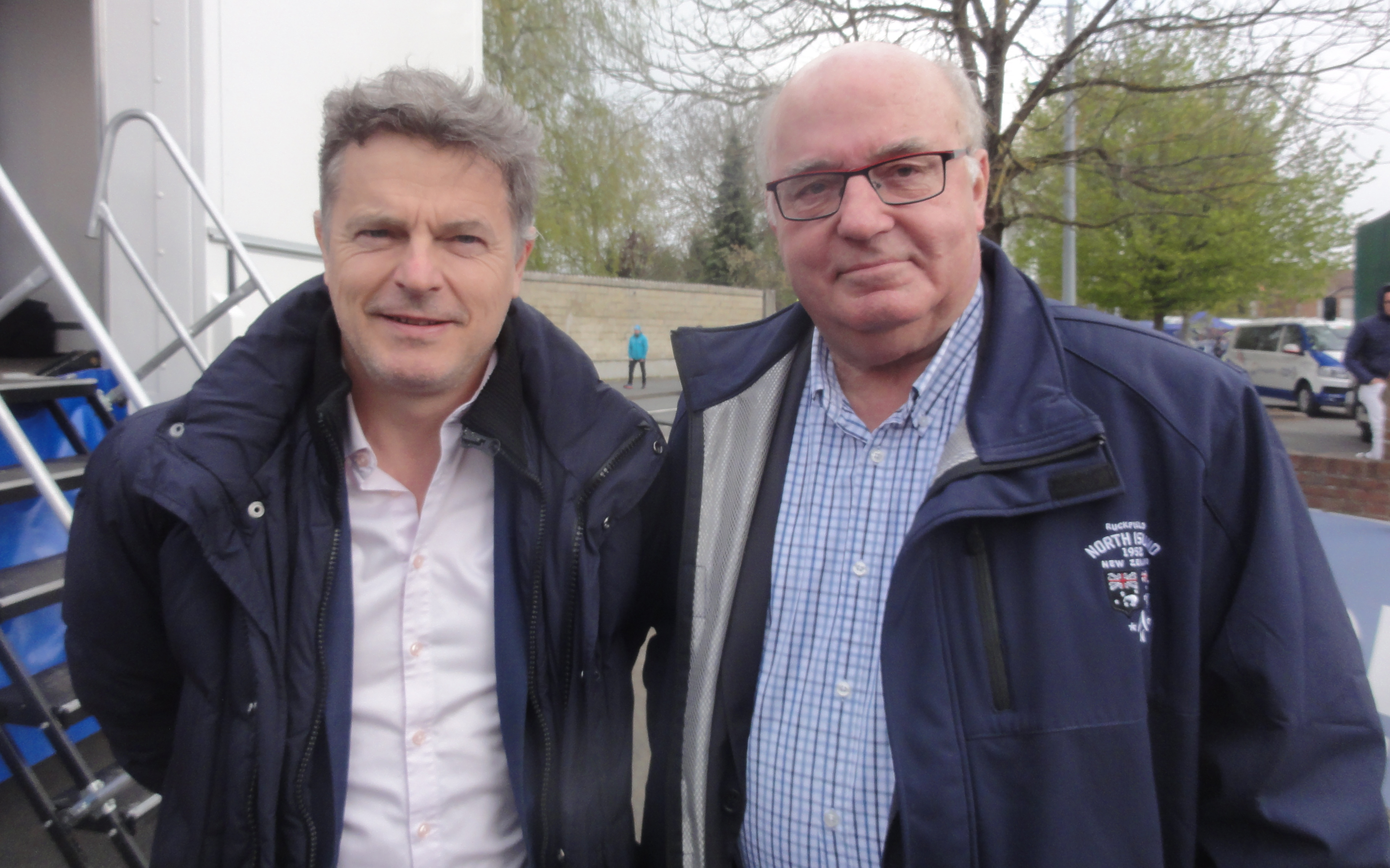 Reportage réalisé le dimanche 14 avril à l'occasion du départ du Paris-Roubaix juniors 2019 à Saint-Amand-les-Eaux, France.